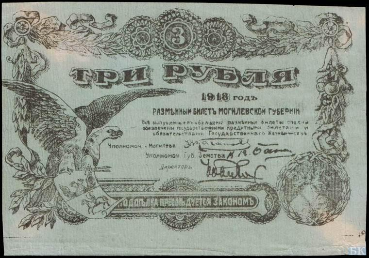 3 рубля Могилёвской губернии 1918, аверс. Срисованы с трёх одесских рублей 1917 года - см. Одесский рубль